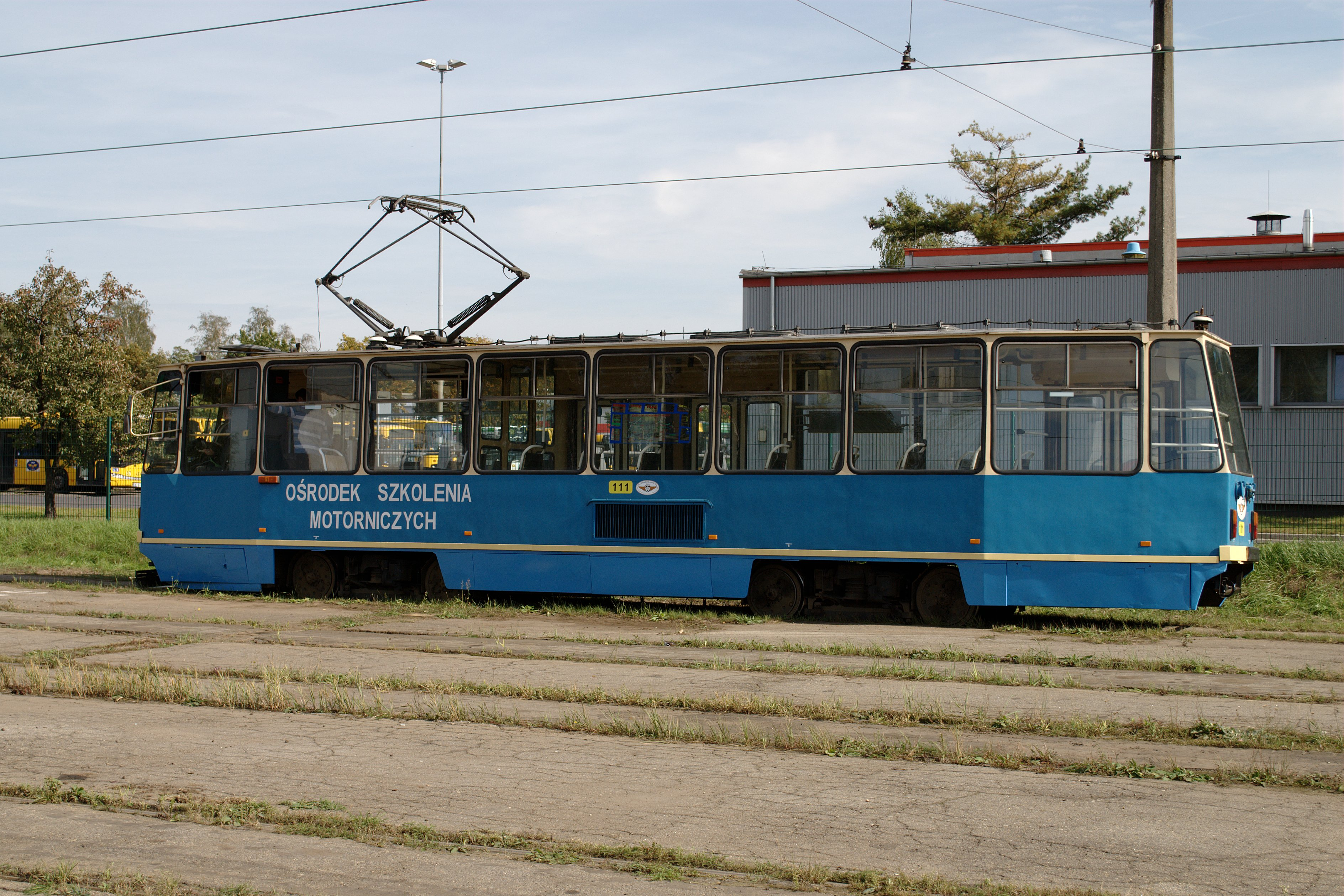 Konstal 105Na 111.